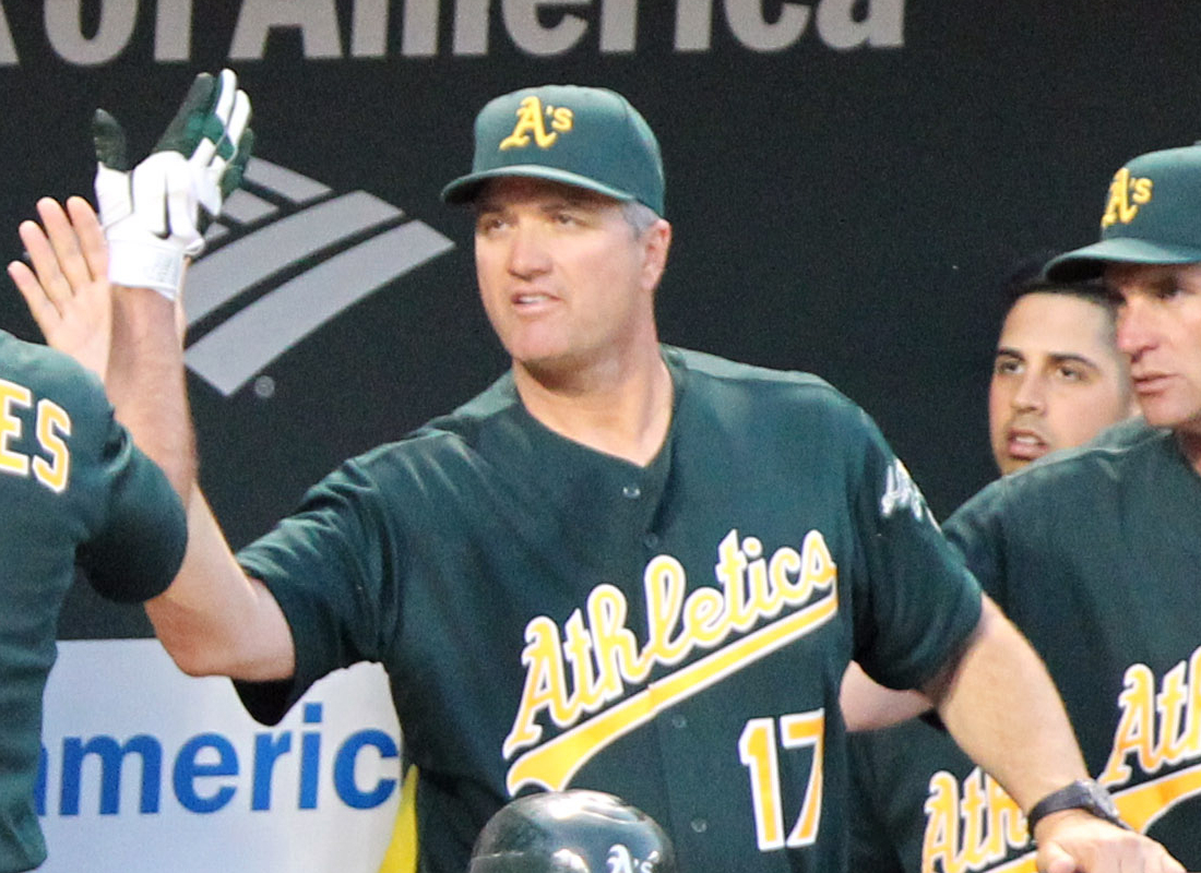 Bob Geren